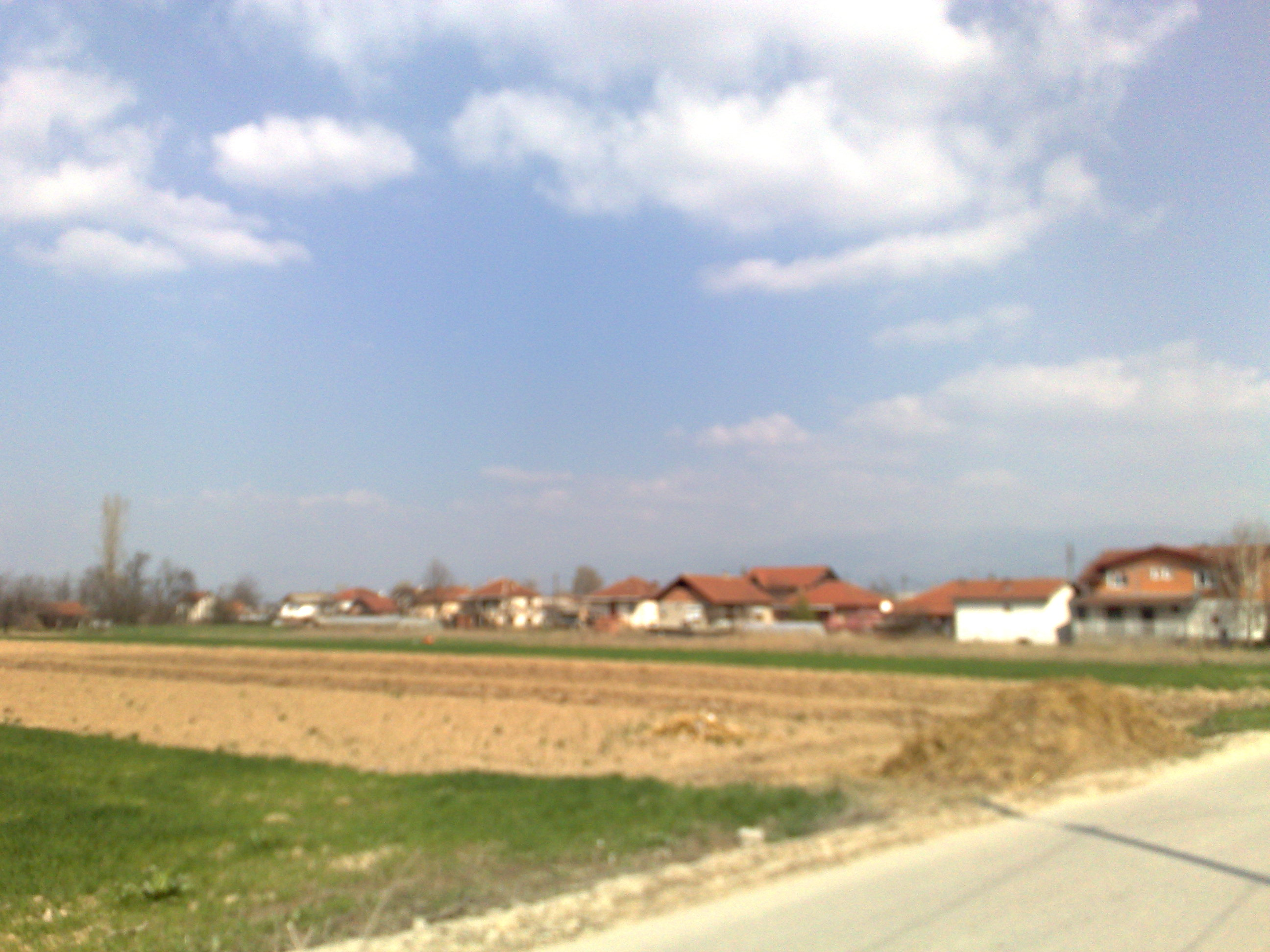 Поглед на дел од селото Долно Лисиче